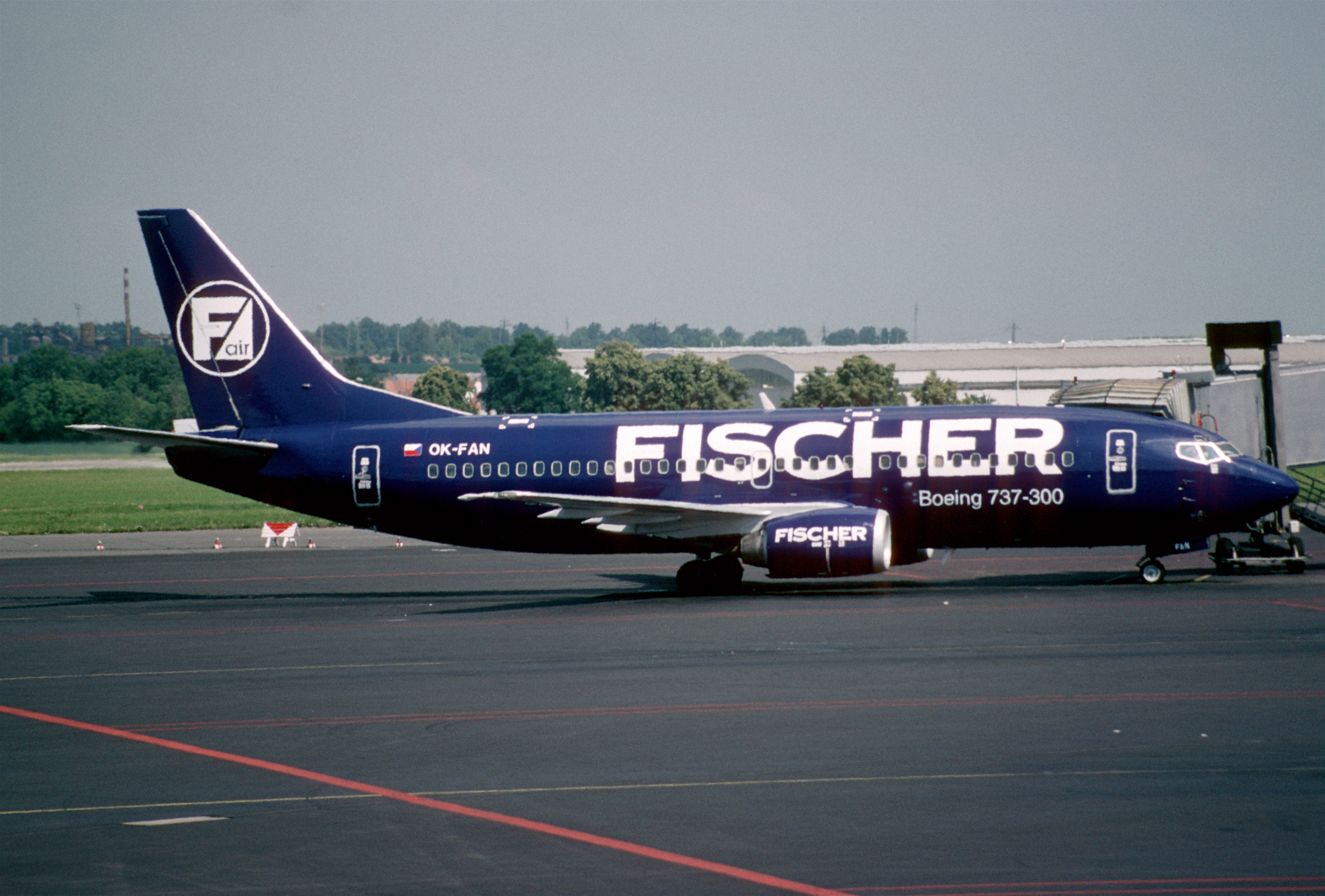 136an - Fischer Air Boeing 737-33A; OK-FAN@PRG;05.07.2001